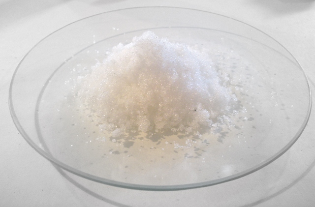 NaH2PO4